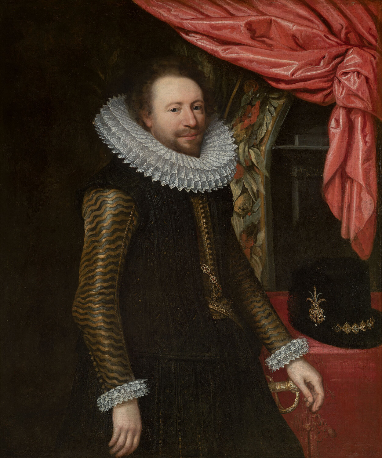 St.Elizabeths Weeshuis: Floris van Pallandt II